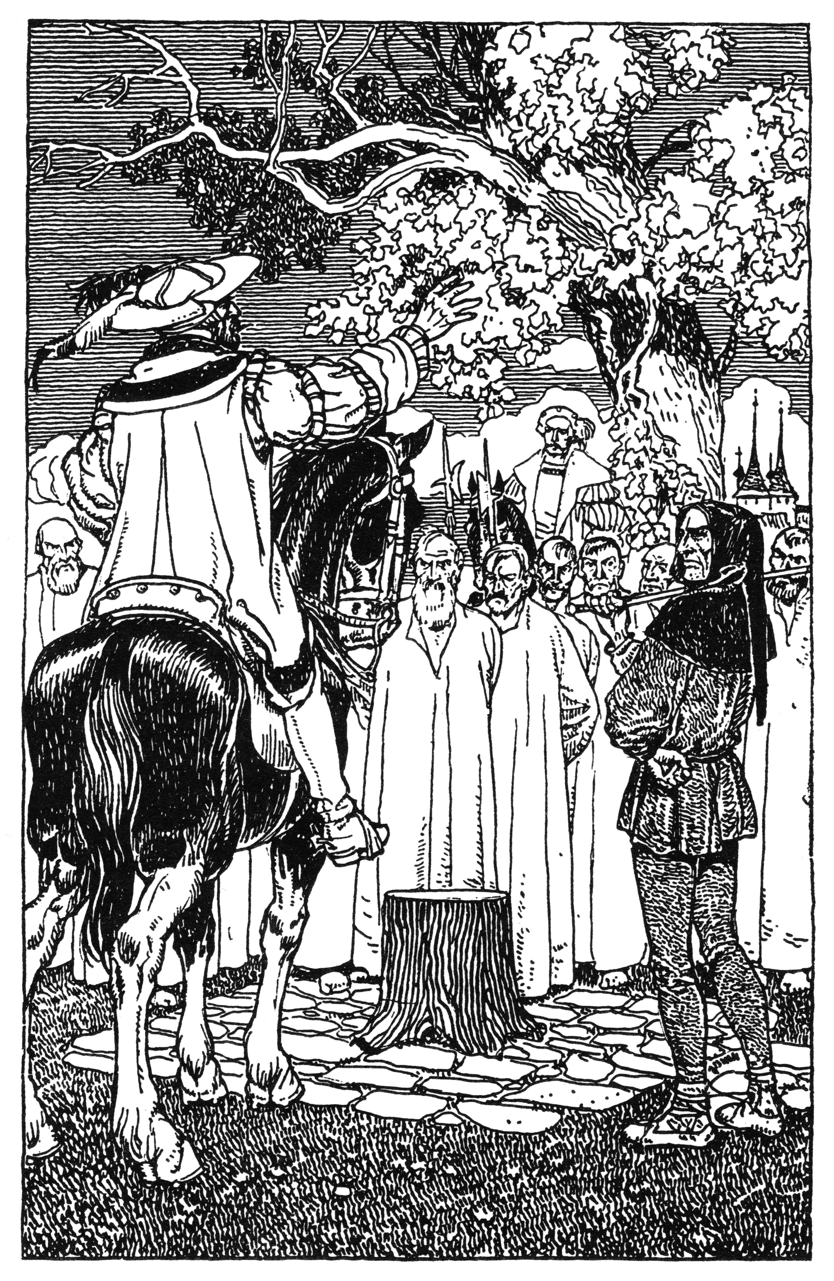 Ilustrace k pověsti „O památném dubu poděbradském“ (poprava kutnohorských havířů pod památným dubem). Kresba Josef Wenig (1885-1939)